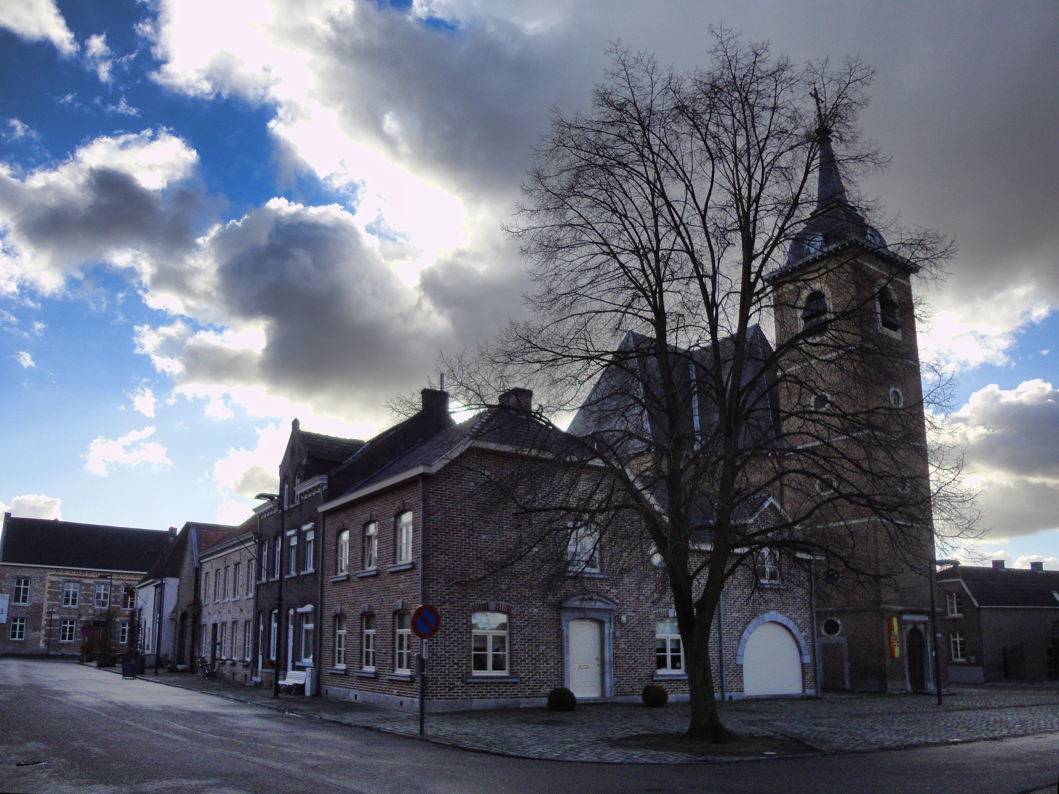 Groenplaats Oud-Rekem